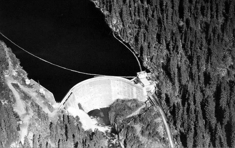 Langlidammen i Oslo, 1951